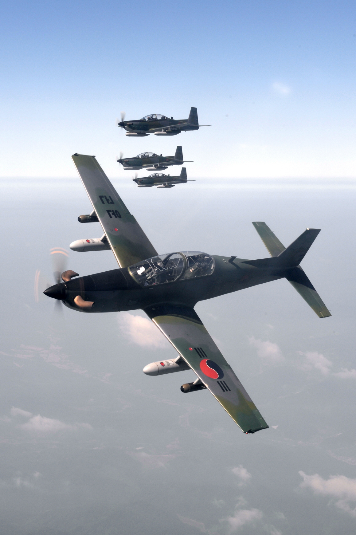 공군 제8전투비행단의 KA-1 전술통제기 편대가 10월 24일(금), 쾌청한 강원도 가을하늘을 누비며 비행임무를 수행하고 있다. KA-1 전술통제기는 국산 기본훈련기 KT-1에 로켓탄과 기관총으로 무장한 경공격기다. KT-1의 페루 수출형인 KT-1P의 초도 납품식이 최근 페루 라스팔마스 공군기지에서 거행되기도 했다.